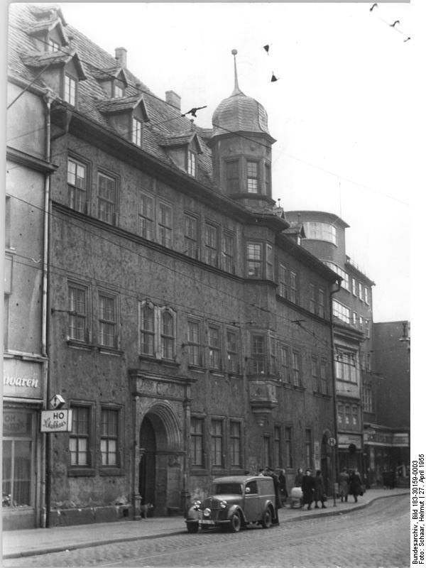 Erfurt, Dschröder'ches Haus Zentralbild TBD-Schaar 27.4.1955 -2936- 3 Motive Schillergedenkstätte in Erfurt. Von August bis 1. Oktober 1791 lebte Schiller mit der Gattin im Hause der Witwe des Holzhändler Bayer "Am Plänchen", jetzt Lange Brücke 36, in Erfurt. Im Eckzimmer des ersten Stockwerkes befand sich damals Schillers Arbeitszimmer. Hier diktierte er seinem Schreiber die "Geschichte des 30-jährigen Krieges." Im Dschröder'schen Haus in Erfurt, Anger 37-39 wohne Schiller mit seiner Gemahlin vom 31.12.1790 bis 11.1.1791. Außerdem verkehrten hier Goethe und Alexander von Humboldt. UBz: Ansicht des Dschröder'schen Hauses. Information added by Wikimedia users. Tippfehler: gemeint ist Dacheröden'sches Haus